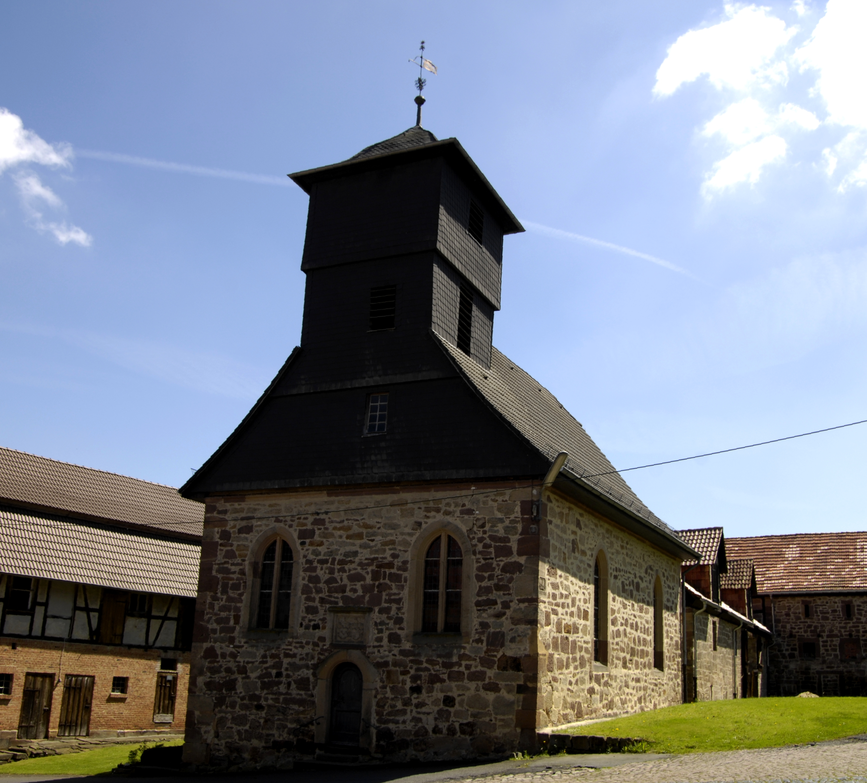 Schloss Riede, Kapelle (Bad Emstal, Nordhessen)